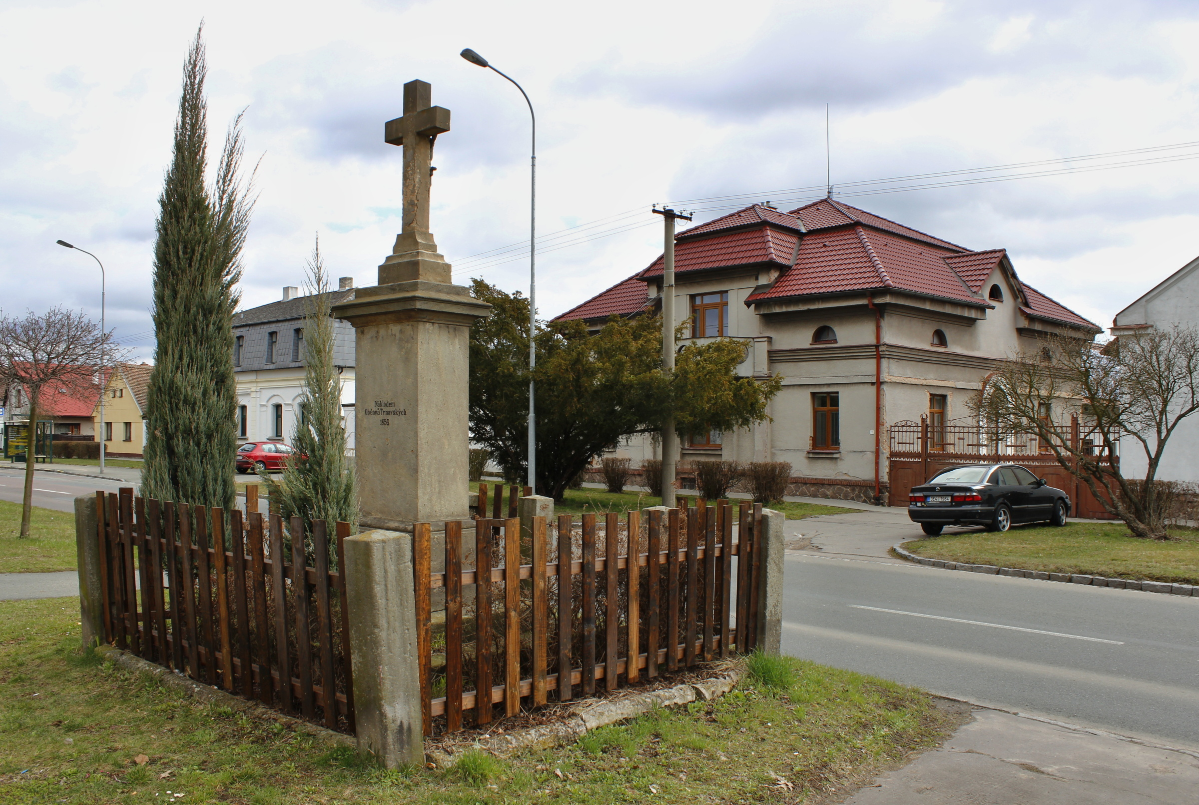 Pardubice, Trnová, Bohdanečská ulice, křížek před domem čp. 2. Text: "Nákladem Občanů Trnavských 1853". Naproti statek čp. 12.